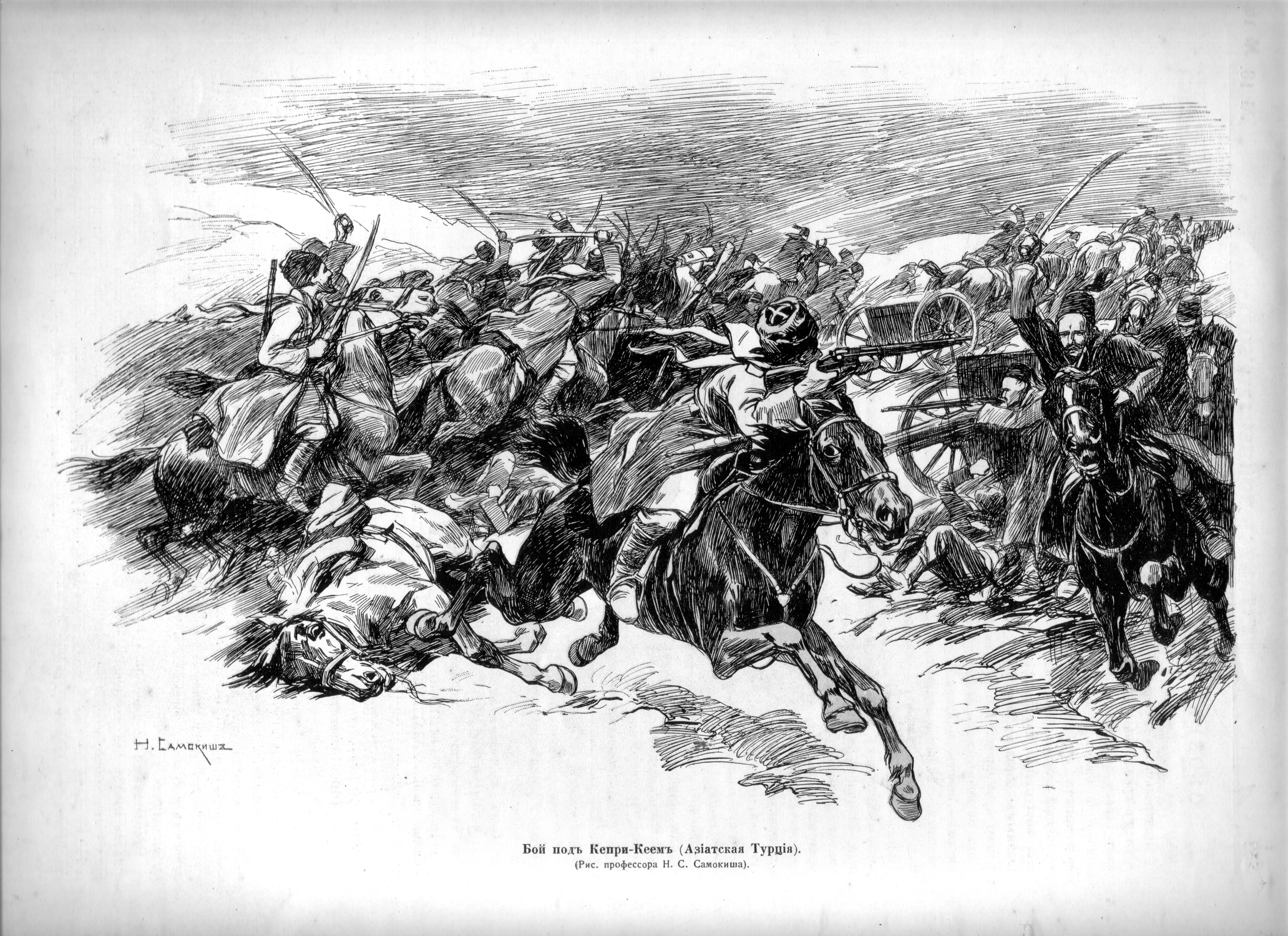 Бой под Кепри-Кеем (Азиатская Турция). Рис. Н.С. Самокиша.